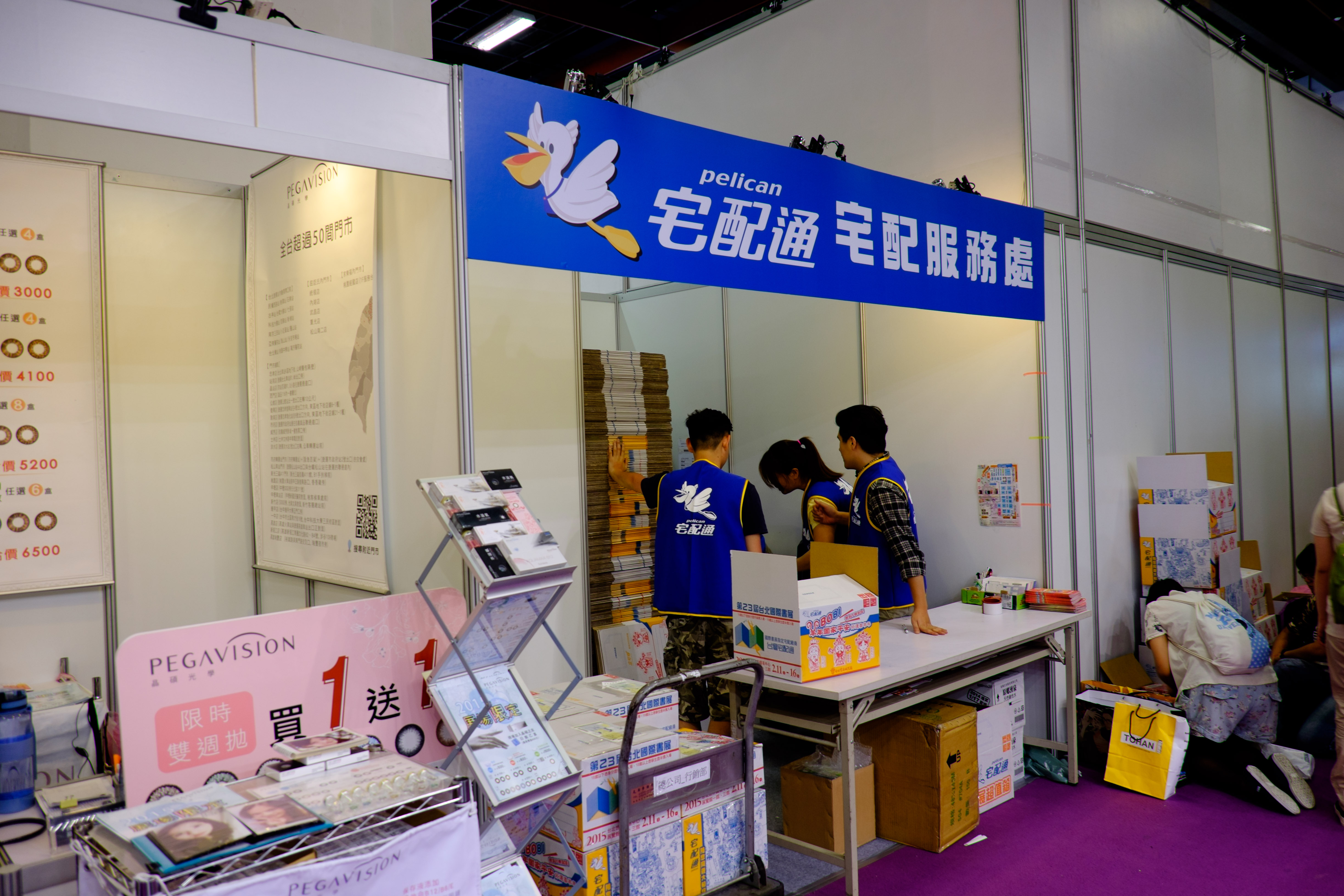 2015漫畫博覽會首日，台灣宅配通宅配服務處。